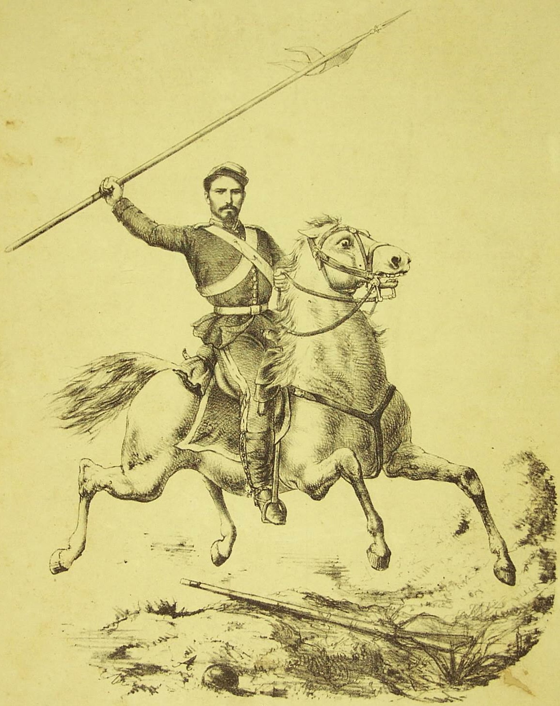 Cabo Francisco de Lacerda, vulgo Chico Diabo